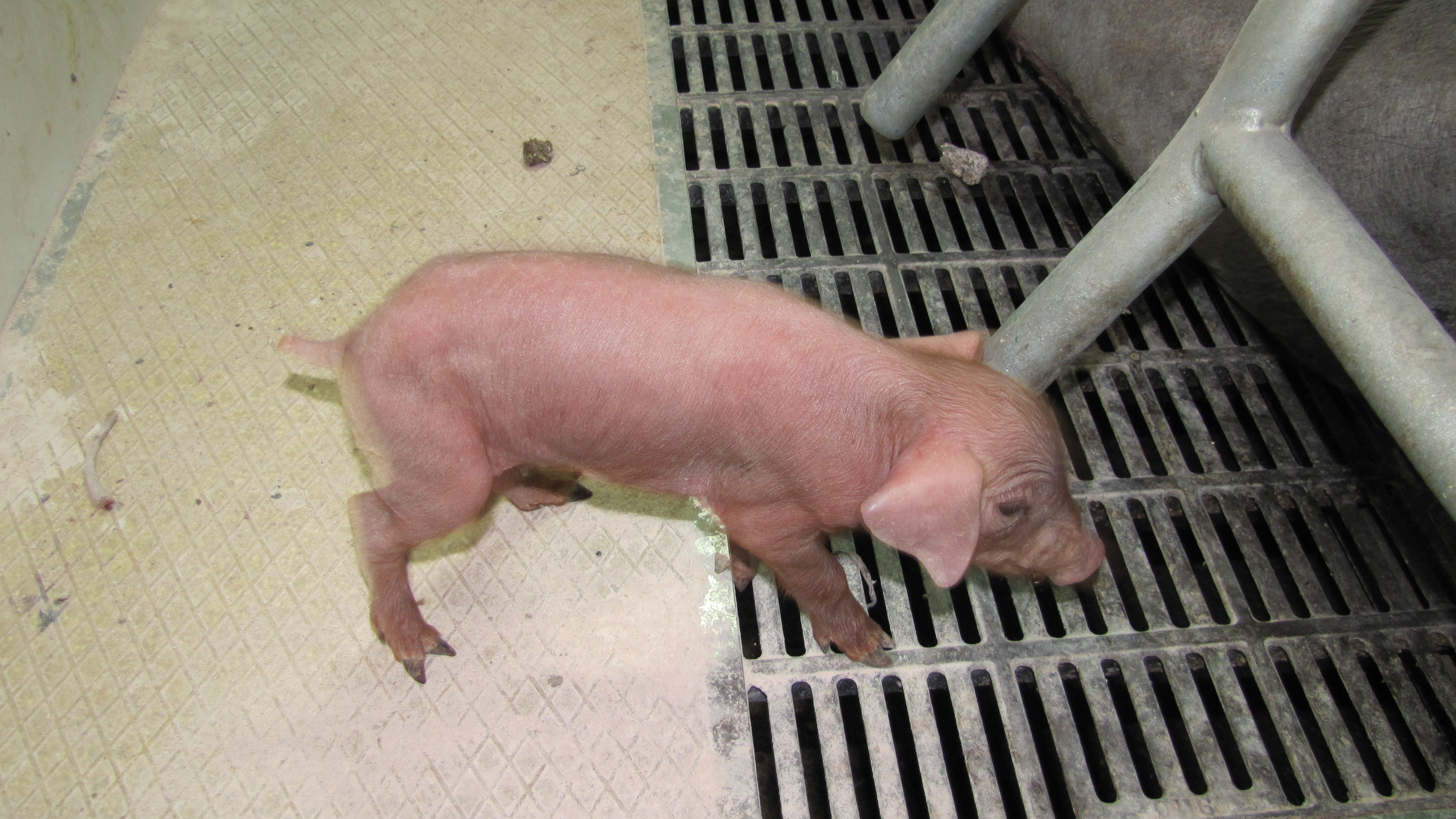 Cerdo Ibérico, con 1 día de edad, tiene el color rojizo que caracteriza a los cochinillos de raza ibérica durante sus primeras semanas de edad, en la finca Los Valhondos, en Pelayos, Salamanca (España), perteneciente al grupo jamonero BEHER, Bernardo Hernandez, de la Denominación de Origen Jamón de Guijuelo.